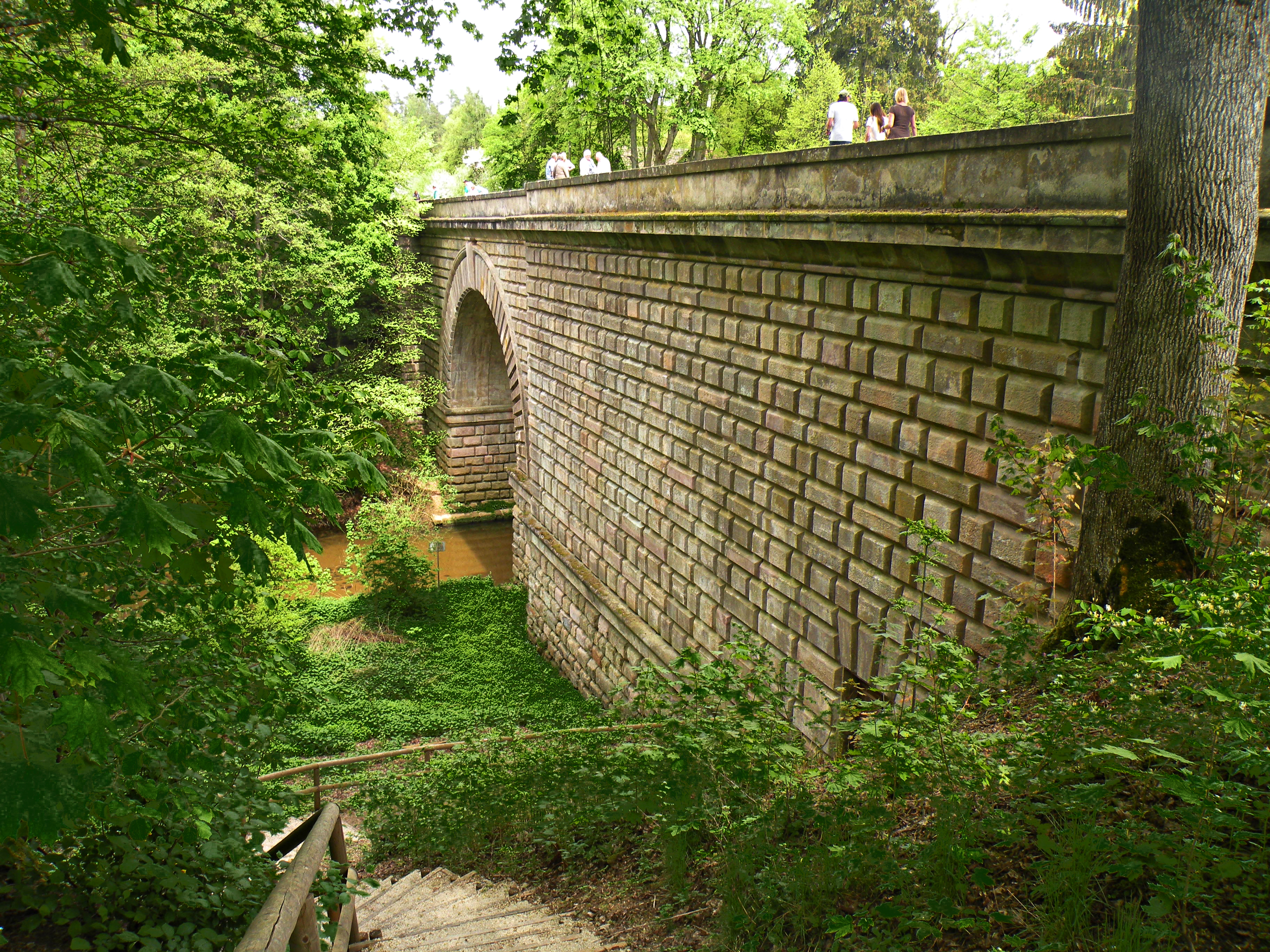 Кленце. Мост-акведук